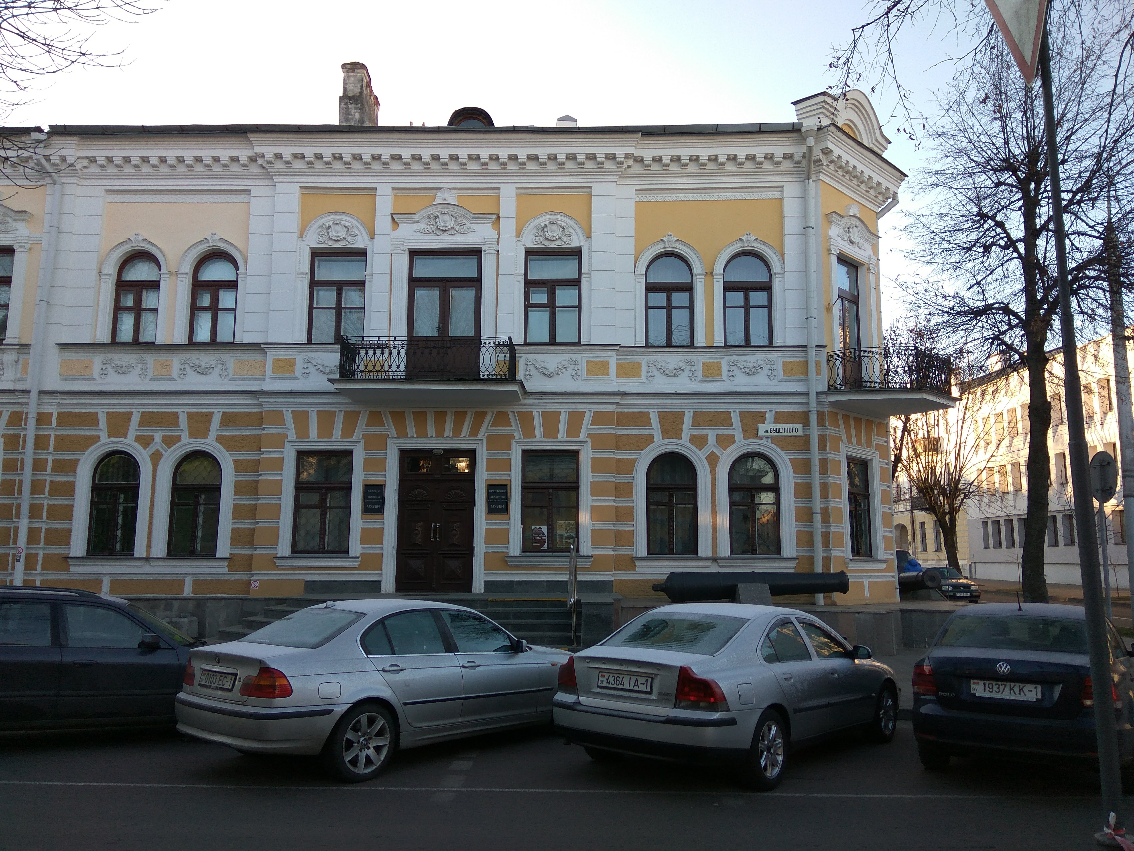 Брэст. Вуліца Будзённага